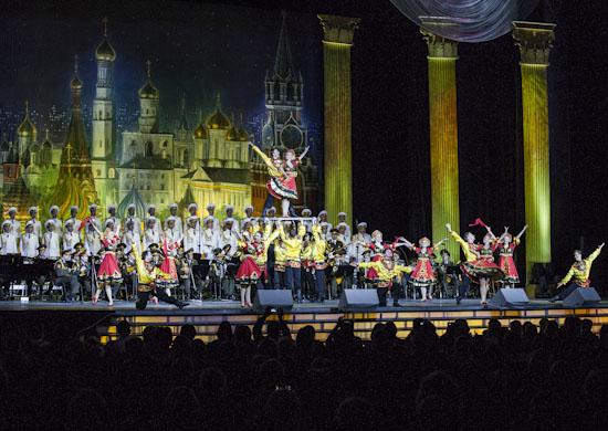 Академический ансамбль песни и пляски Российской Армии имени А. В. Александрова